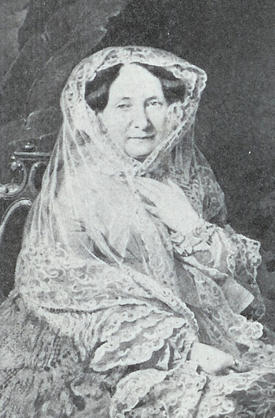 Foto van koningin Anna (1855). Dit is de enige keer dat zij poseerde voor een fotograaf. Het is gemaakt tijdens haar laatste bezoek aan Rusland, ter gelegenheid van de kroning van haar neef Alexander II, door R. Severin. Auteursrecht is begrijpelijkerwijs verlopen. Afbeelding komt in meerdere publicaties voor.